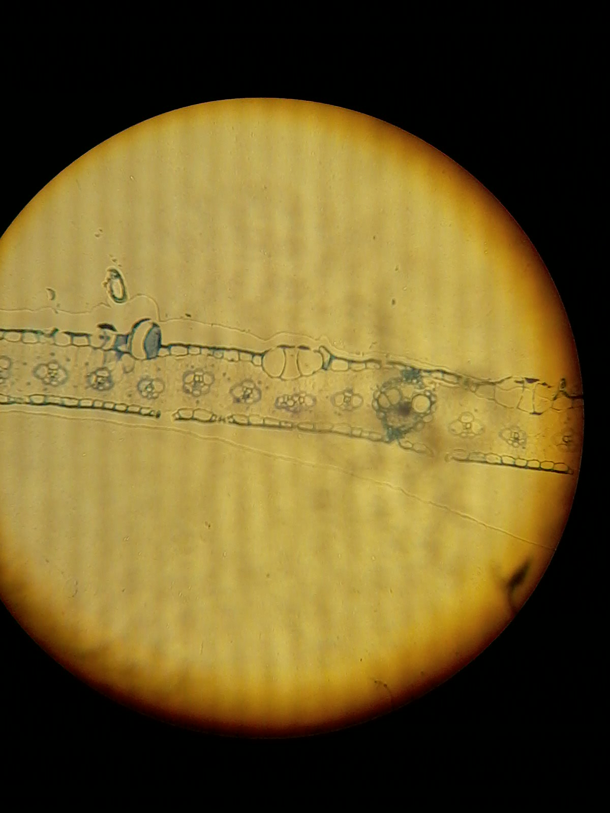 Células buliformes entre a epiderme das folhas de uma gramínea